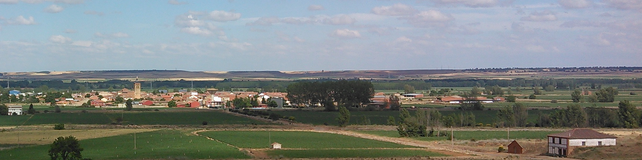 Vista panorámica del pueblo de Villademor de la Vega (provincia de León, comunidad autónoma de Castilla y León, España), desde las bodegas.